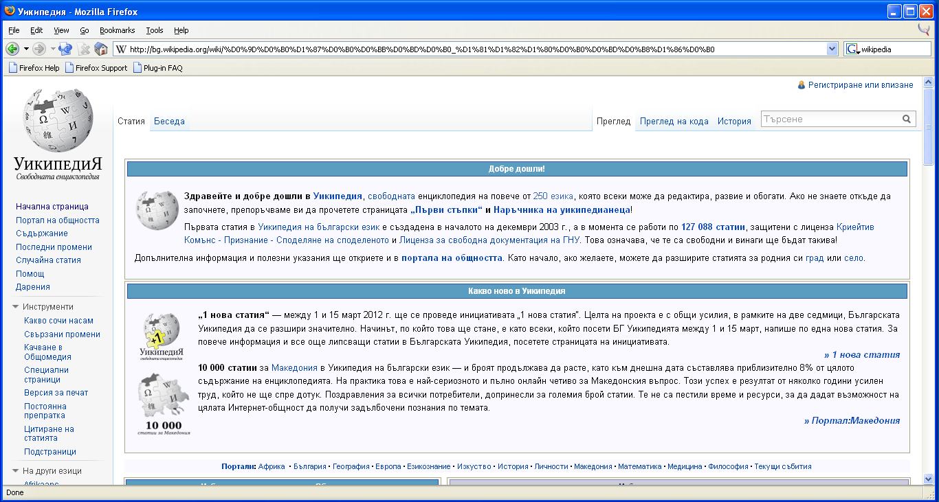 Mozilla Firefox 0.8 - първата версия на браузъра Mozilla Firefox